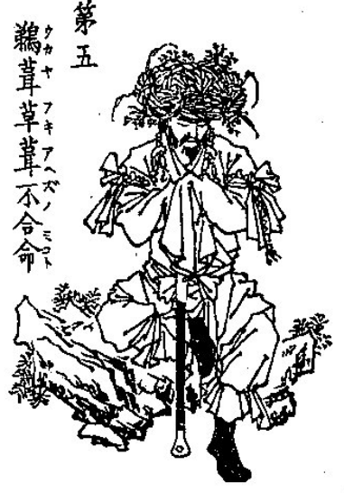 万物雛形画譜